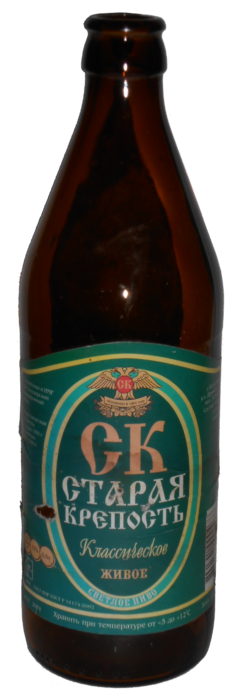 Пиво Старая крепость Бендерского пивоваренного завода